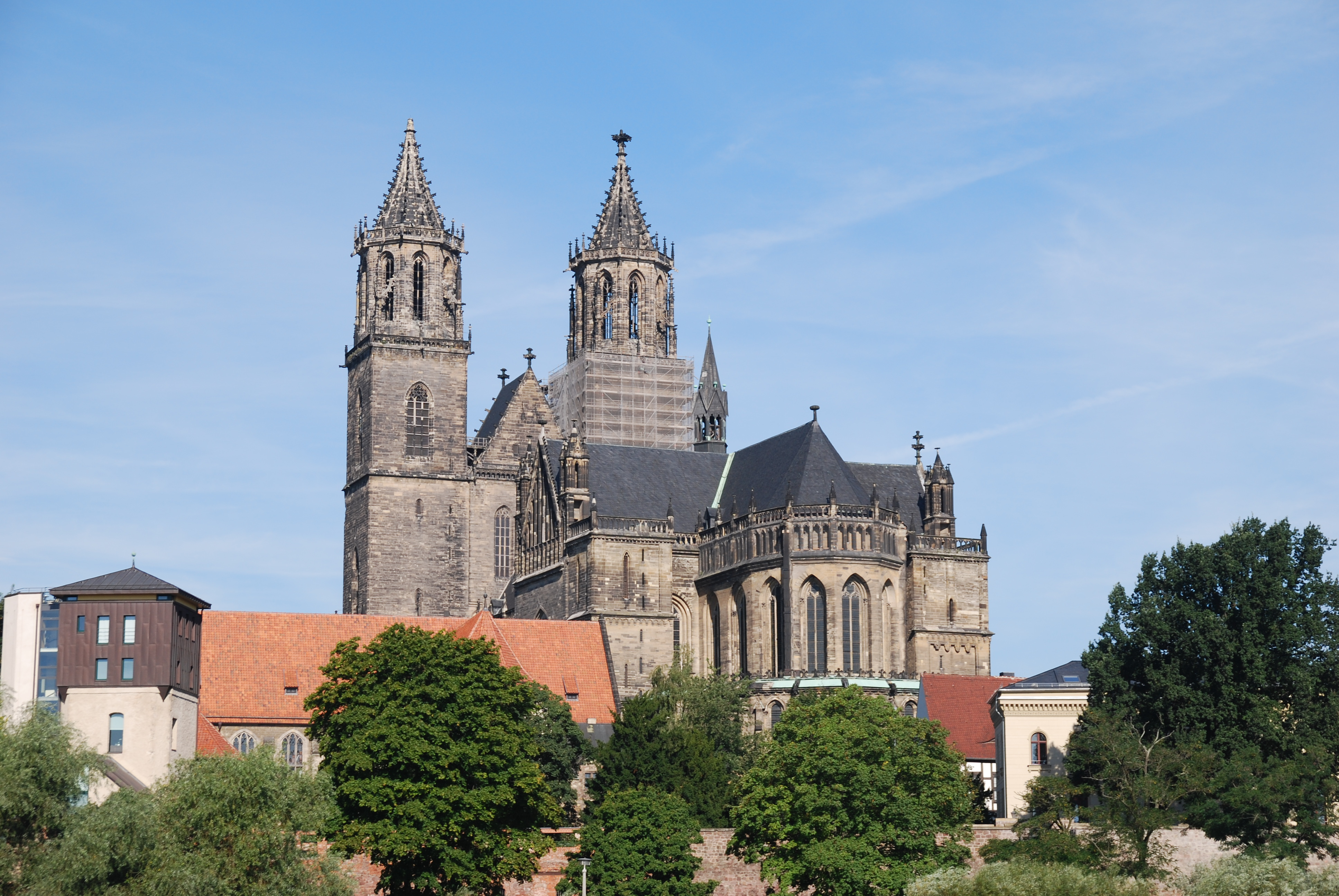 Dom zu Magdeburg